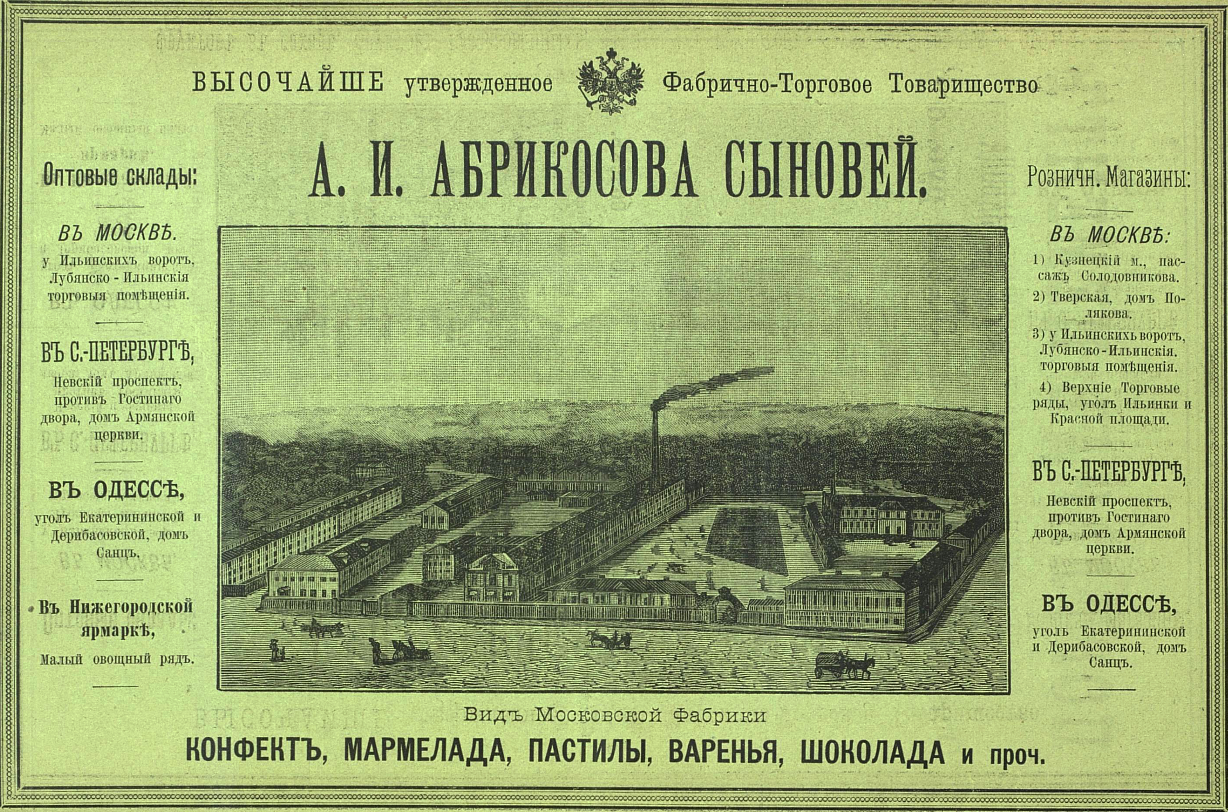 Реклама товарищества А. И. Абрикосова сыновей, 1896 год.